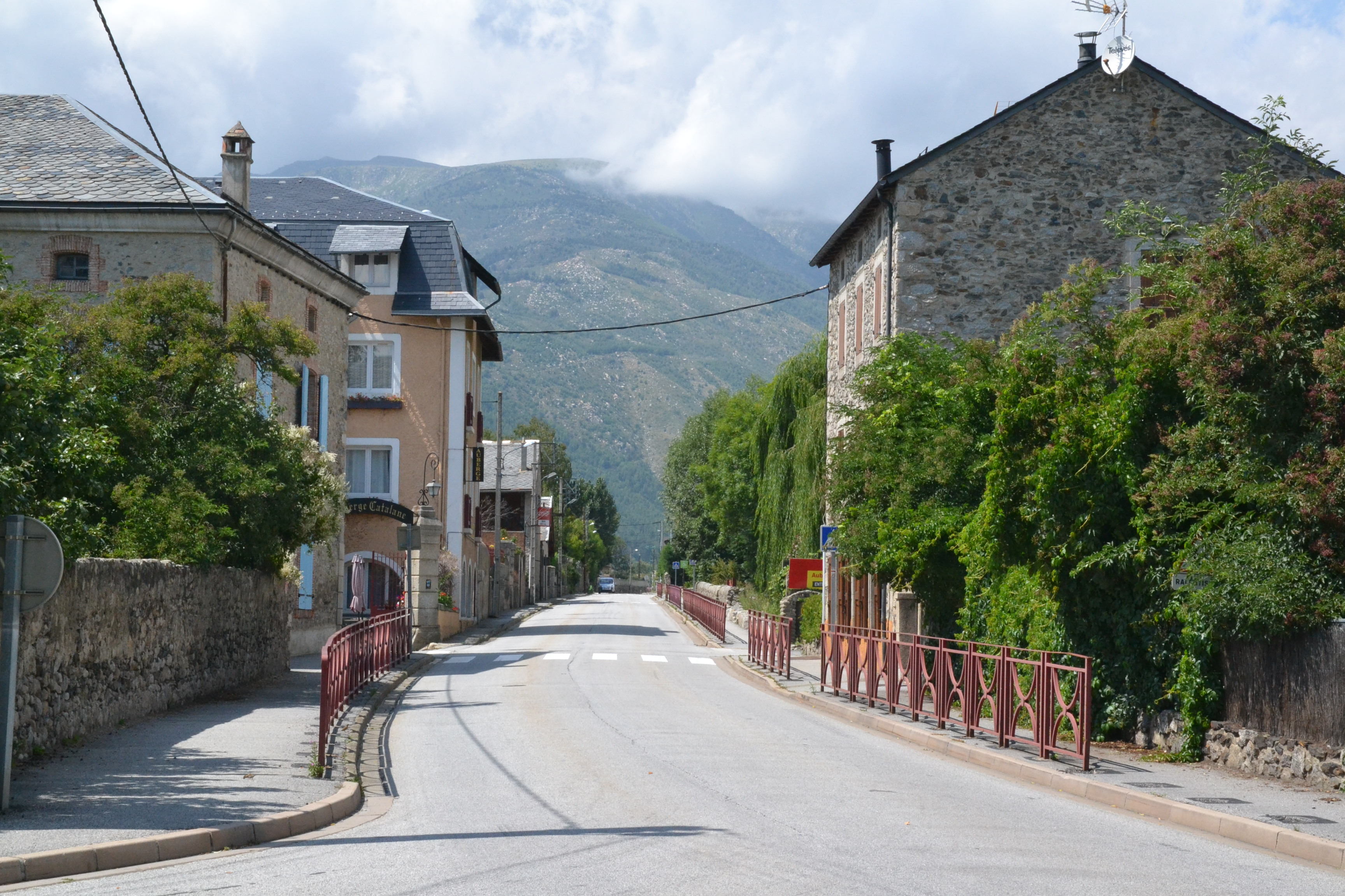 Passage de la Route nationale 20 dans le village de Latour-de-Carol (Pyrénées-Orientales, France).